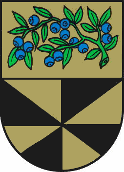 Affinghausen hat früher zur Grafschaft bzw. zum Amt Bruchhausen gehört. Hierauf deutet das verschobene Kreuz hin. Auf die starke Bindung zu Bremen weist der Zweig mit den Beeren hin: Die Einwohner pflegten alle möglichen landwirtschaftlichen Produkte in der Hansestadt zu verkaufen und wurden daher scherzhaft (insbesondere wegen der Veräußerung von Heidelbeeren) als Bickbeernbuern bezeichnet.